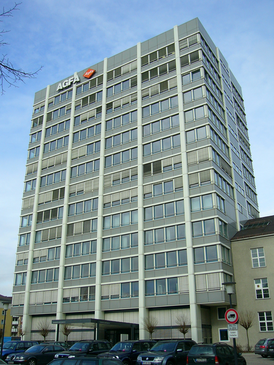 Ehem. AGFA-Hochhaus in München-Giesing (erbaut 1959, Höhe 52 m, 14 Stockwerke, gesprengt am 17.02.2008